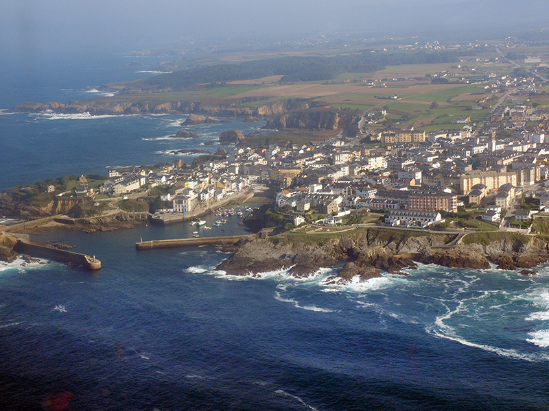 Puerto Asturiano del Cantábrico